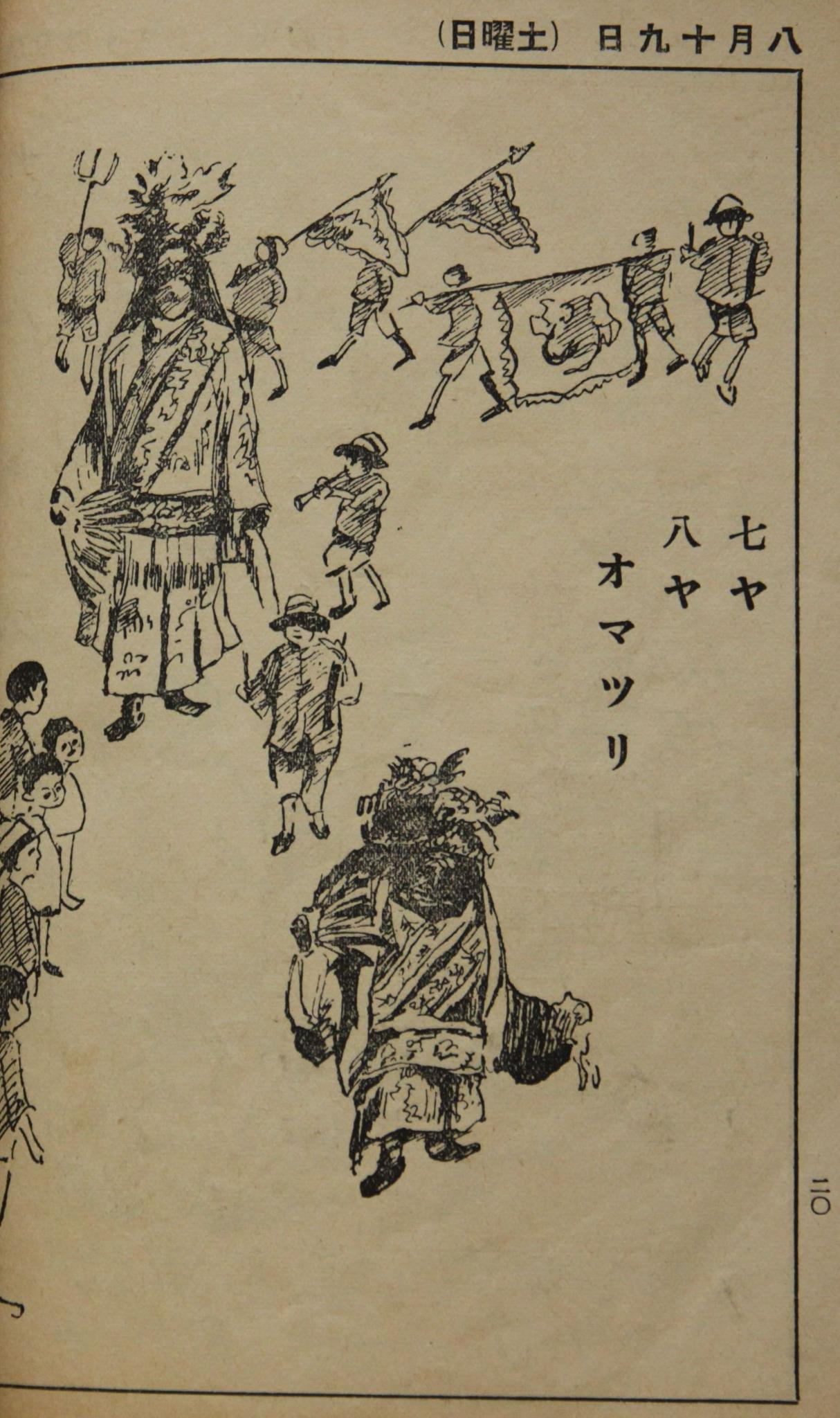 日本時期臺灣課本上的七爺八爺出巡插圖